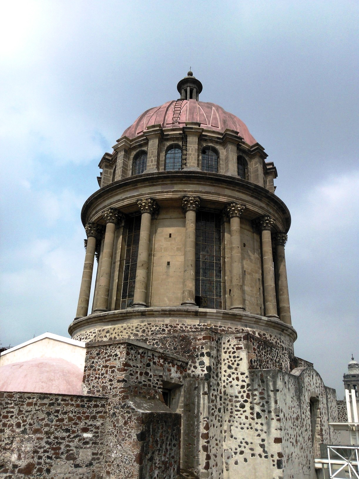 Cúpula de la iglesia de Santa Teresa la Antigua